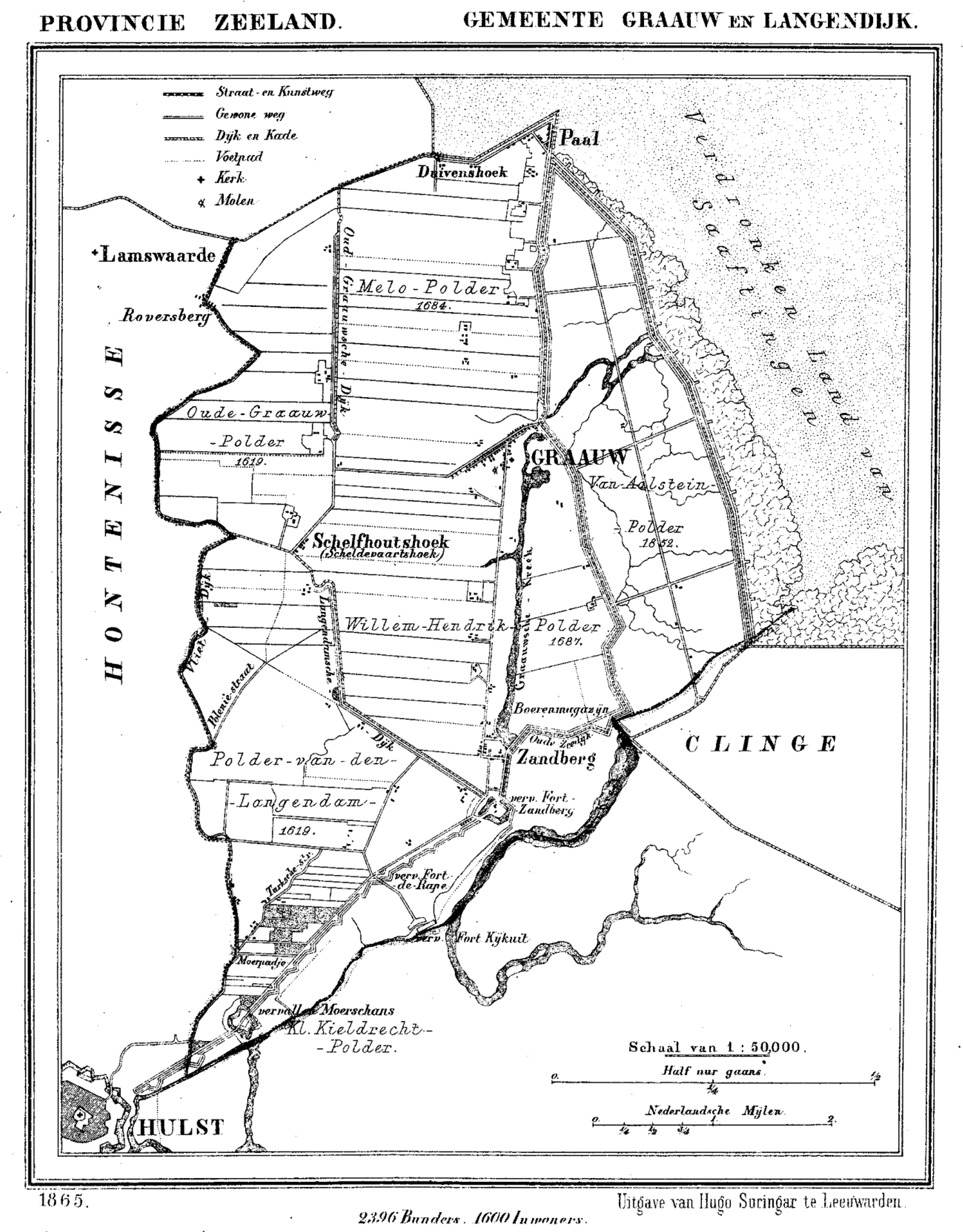 Gemeente Graauw, Zeeland, Nederland